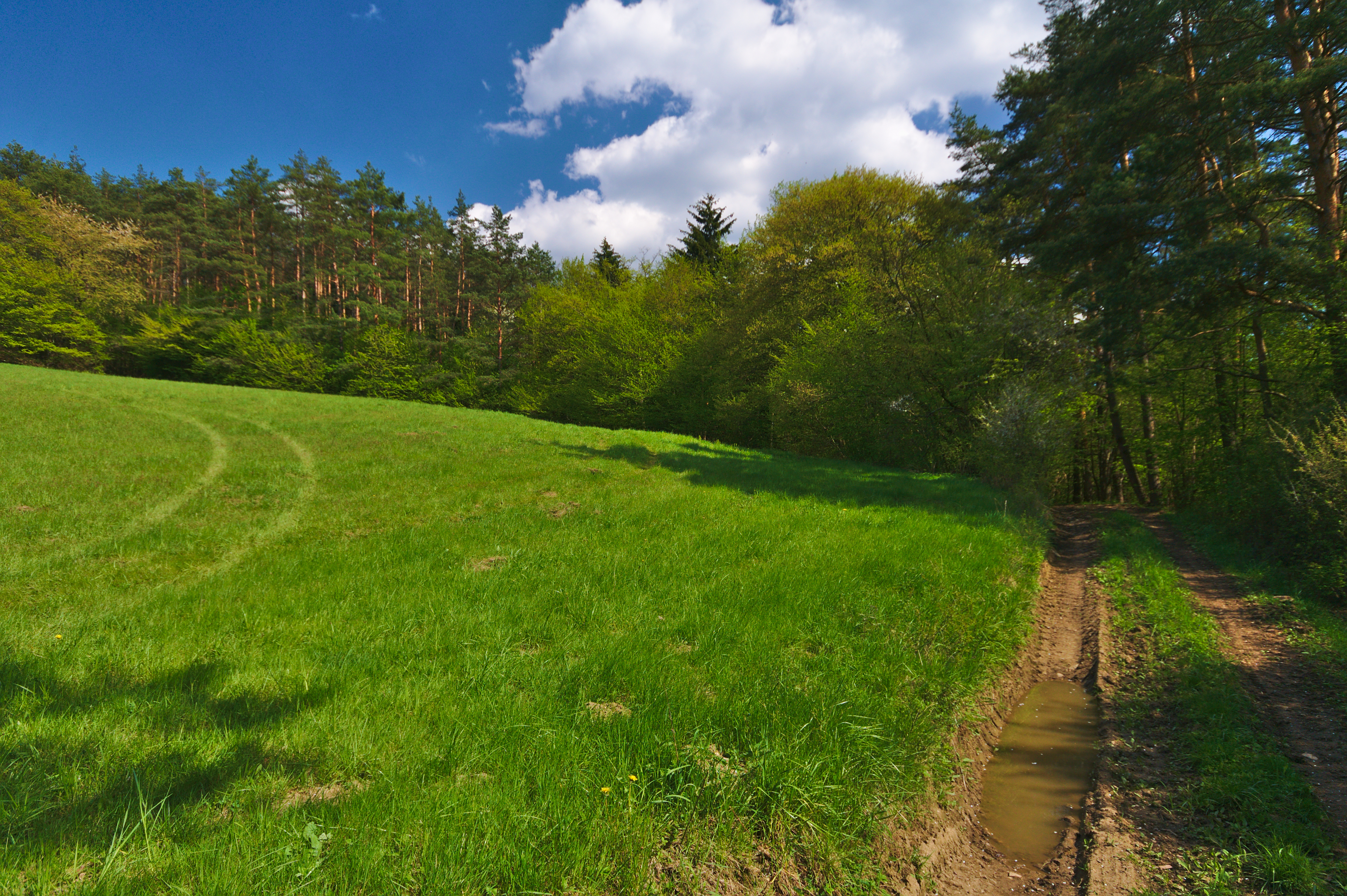 Přírodní památka Švařec, okres Žďár nad Sázavou